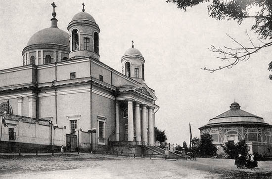 Костьол Святого Олександра: Костьол Святого Олександра, фото початку 20 ст.